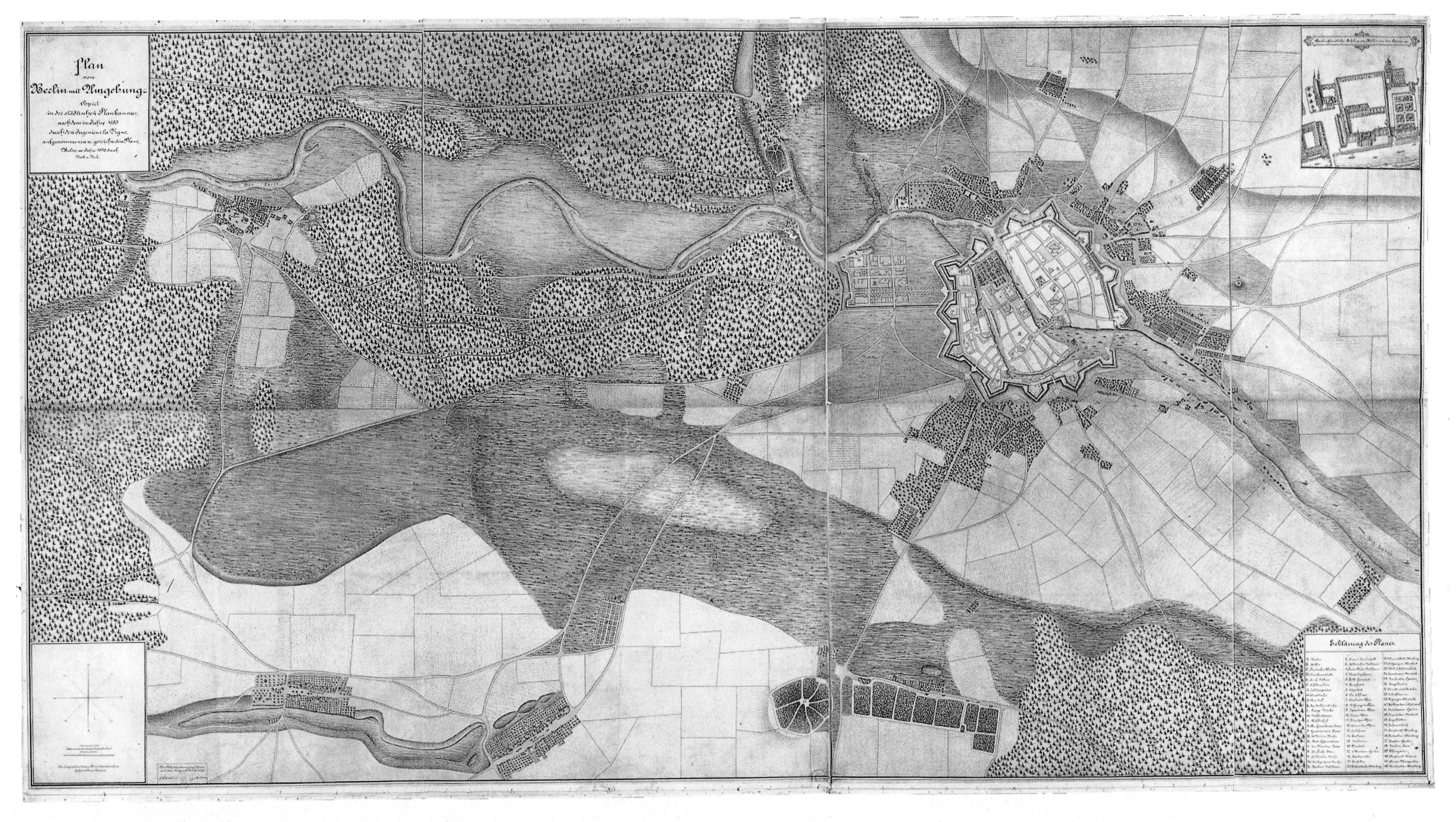 Zeichnung von Rieck und Beck, Städt. Plankammer Berlin, Kopie nach dem Plan von La Vigne. Das Original von La Vigne lagerte im Hohenzollern-Museum (Schloss Monbijou) und wurde im Zweiten Weltkrieg zerstört. Links oben steht der Titel mit dem Zuzsatz "Copirt in der städtischen Plankammer, nach dem im Jahre 1685 durch den Ingenieur la Vigne, aufgenommenen u. gezeichneten Plane, Berlin, im Jahre 1890 durch Rieck u. Beck". Links unten eine Windrose, eine Maßstabsleiste über 100 Rh.R. und die Bemerkung "Das Original zu diesem Plane befindet sich im Hohenzollern-Museum". Rechts oben das Schloss aus der Vogelperspektive mit der Übertitel "Das kurfürstliche Schloß zu Kölln an der Spree". Rechts unten eine Legende mit 16 Ziffern. Auf dem Wasser sind zahlreiche Schiffe zur Verzierung eingezeichnet. Der ursprüngliche Plan wurde 1683 nach Abschluss der Befestigungsarbeiten angefertigt und stellt auch geplante Erweiterungen der Befestigung durch gepunktete Linien dar.